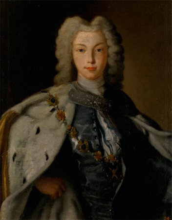 ПОРТРЕТ ИМПЕРАТОРА ПЕТРА II Неизвестный художник Холст, масло. Император Петр II представлен на гладком светло-коричневом фоне по пояс. Торс изображен в небольшом повороте вправо, голова - в фас. На голове Петра белый пудренный парик, букли которого спускаются вдоль щек. Петр одет в расстегнутый на груди серебристо-серый кафтан с пуговицами по левому борту. Под кафтаном сорочка бело-серого цвета. Шею обхватывает такого же цвета платок. Поверх кафтана - горностаевая мантия, скрепленная под шеей перевязью с драгоценными камнями. На груди цепь и крест ордена св.Андрея Первозванного. Правая рука Петра упирается в бок, левая, срезанная краем холста, отведена в сторону.